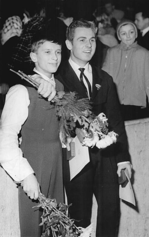 Ralf Borghardt, Günther Zöllner Zentralbild Gahlbeck 6.1.1963 Deutsche Meisterschaften im Eiskunstlauf vom 4. bis 6.1.1963 in Karl-Marx-Stadt. UBz: Den deutschen Meistertitel beim Kunstlaufen der Herren holte sich Ralf Borghardt (rechts) vor Günther Zöllner.